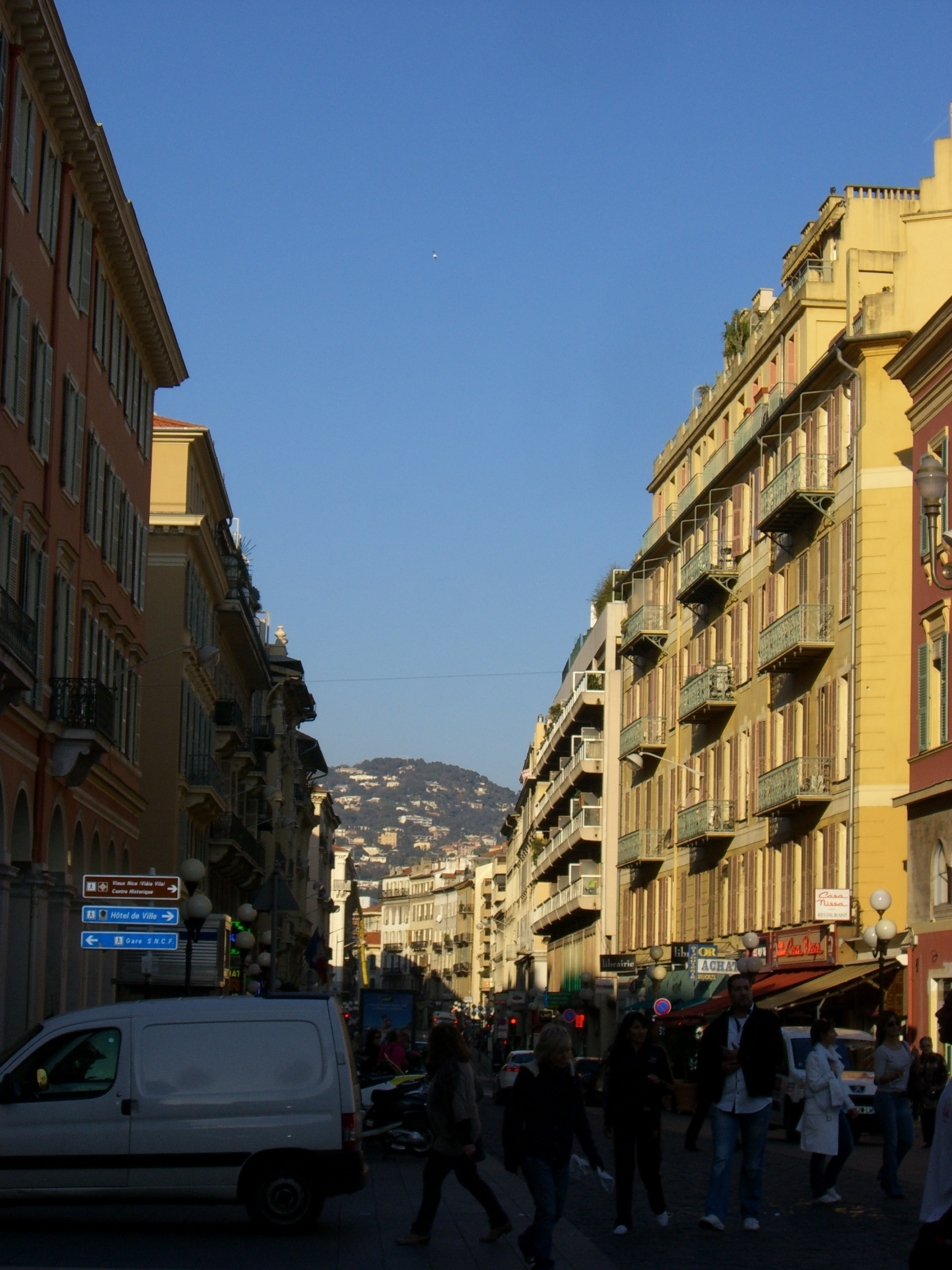 Photo de la rue Gioffredo prise de la rue Masséna.